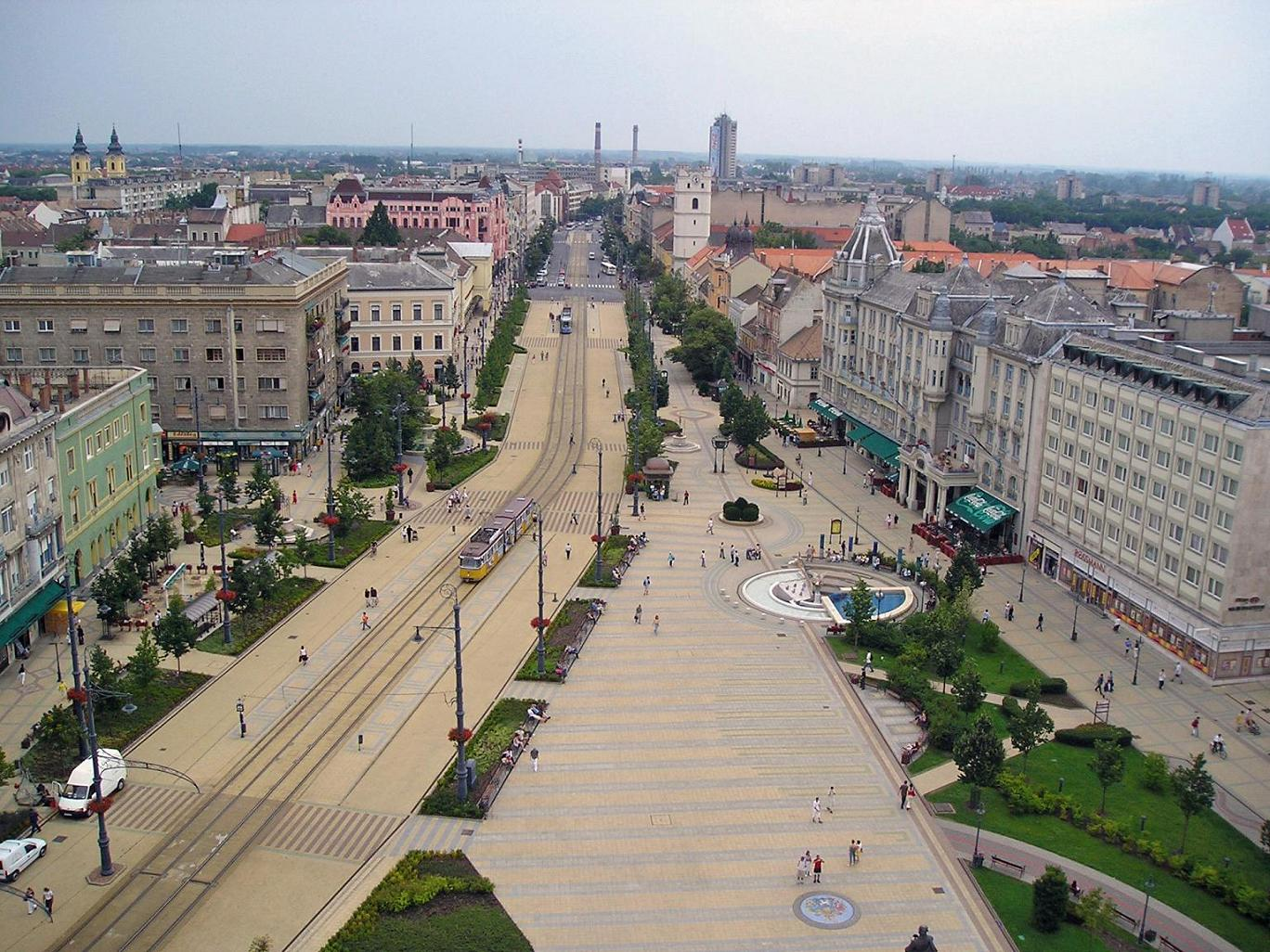 Panoramablick von der reformierte Kirche in Debrecen, Ungarn